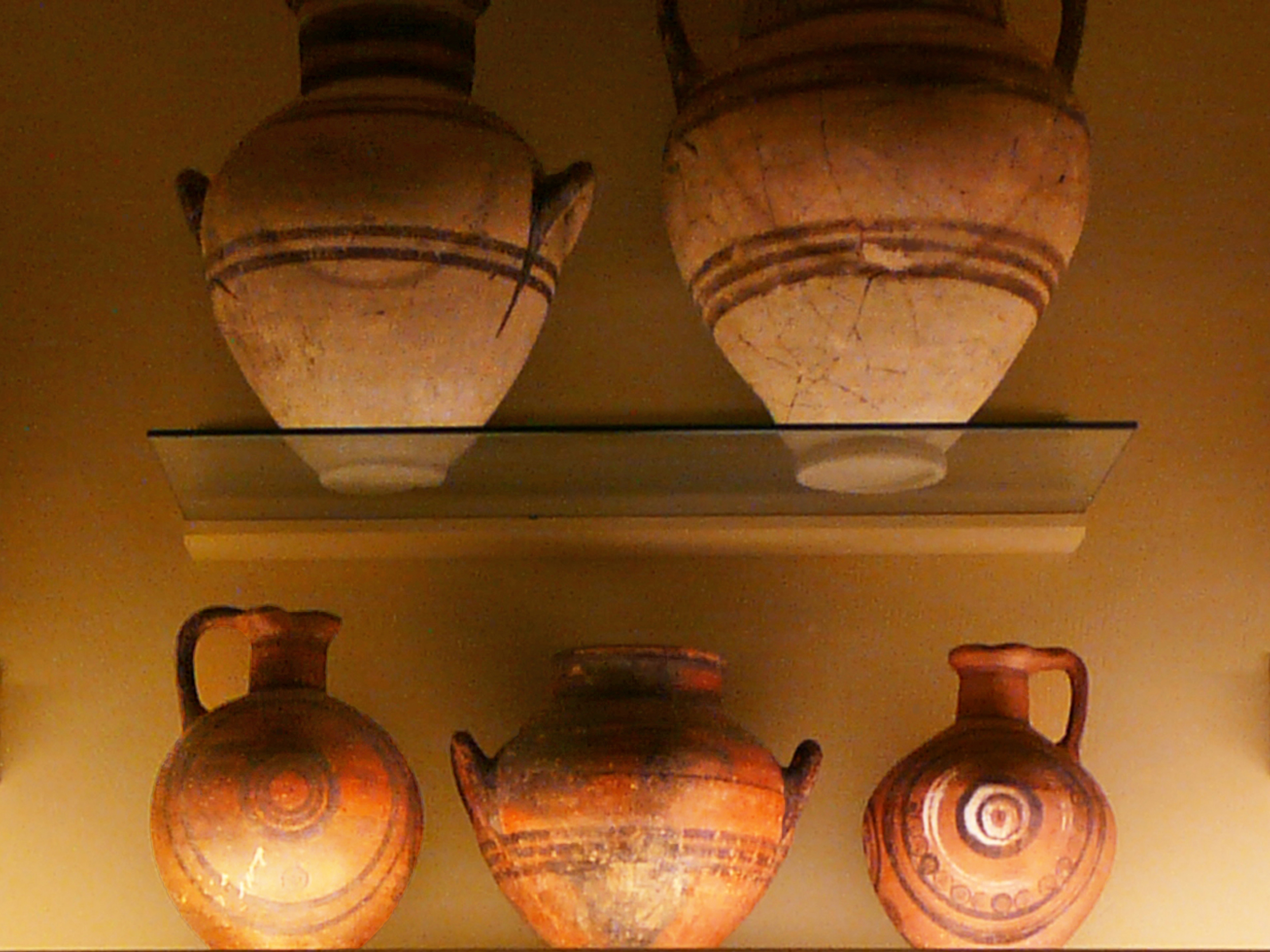 посуда